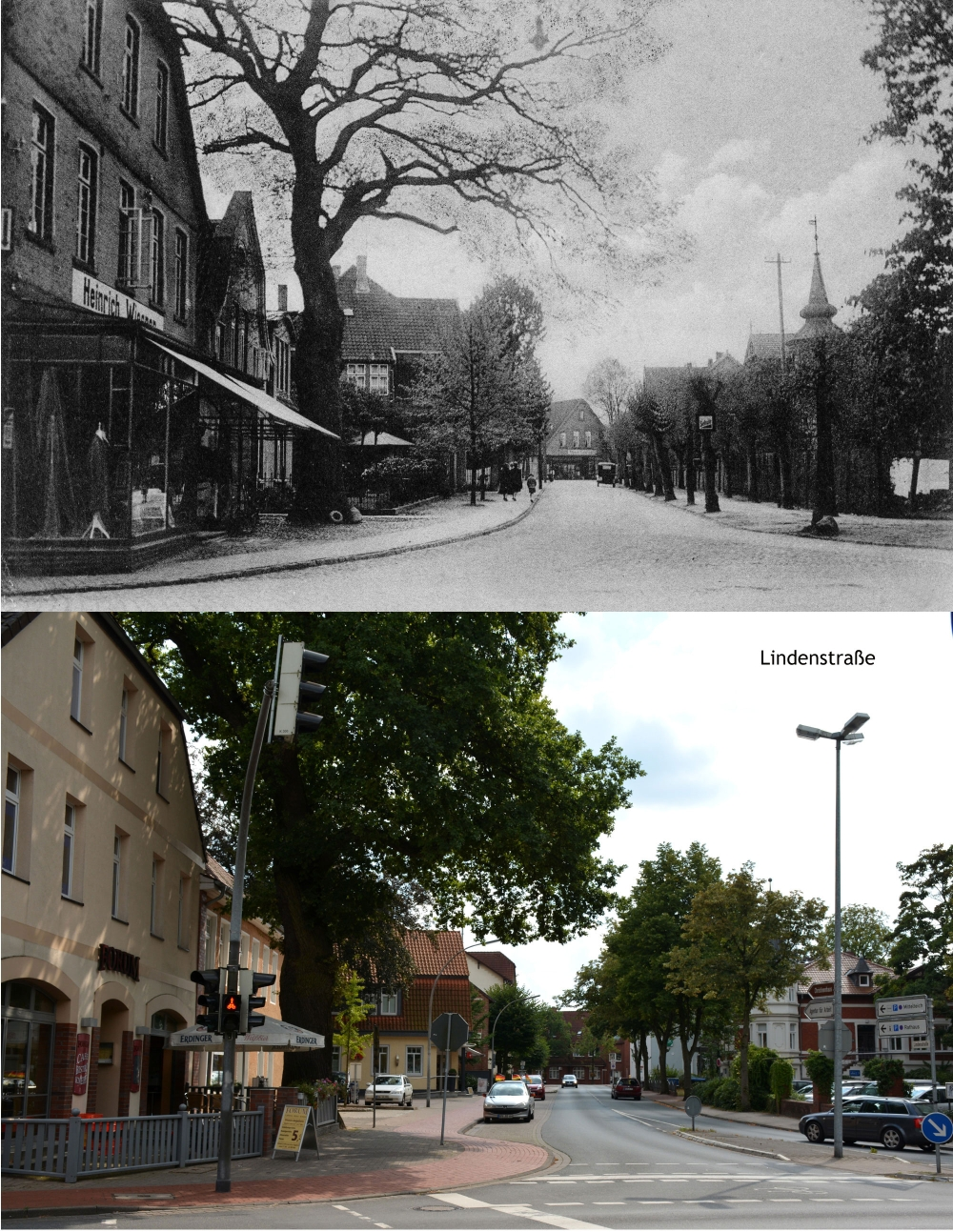 Lindenstraße Zeven